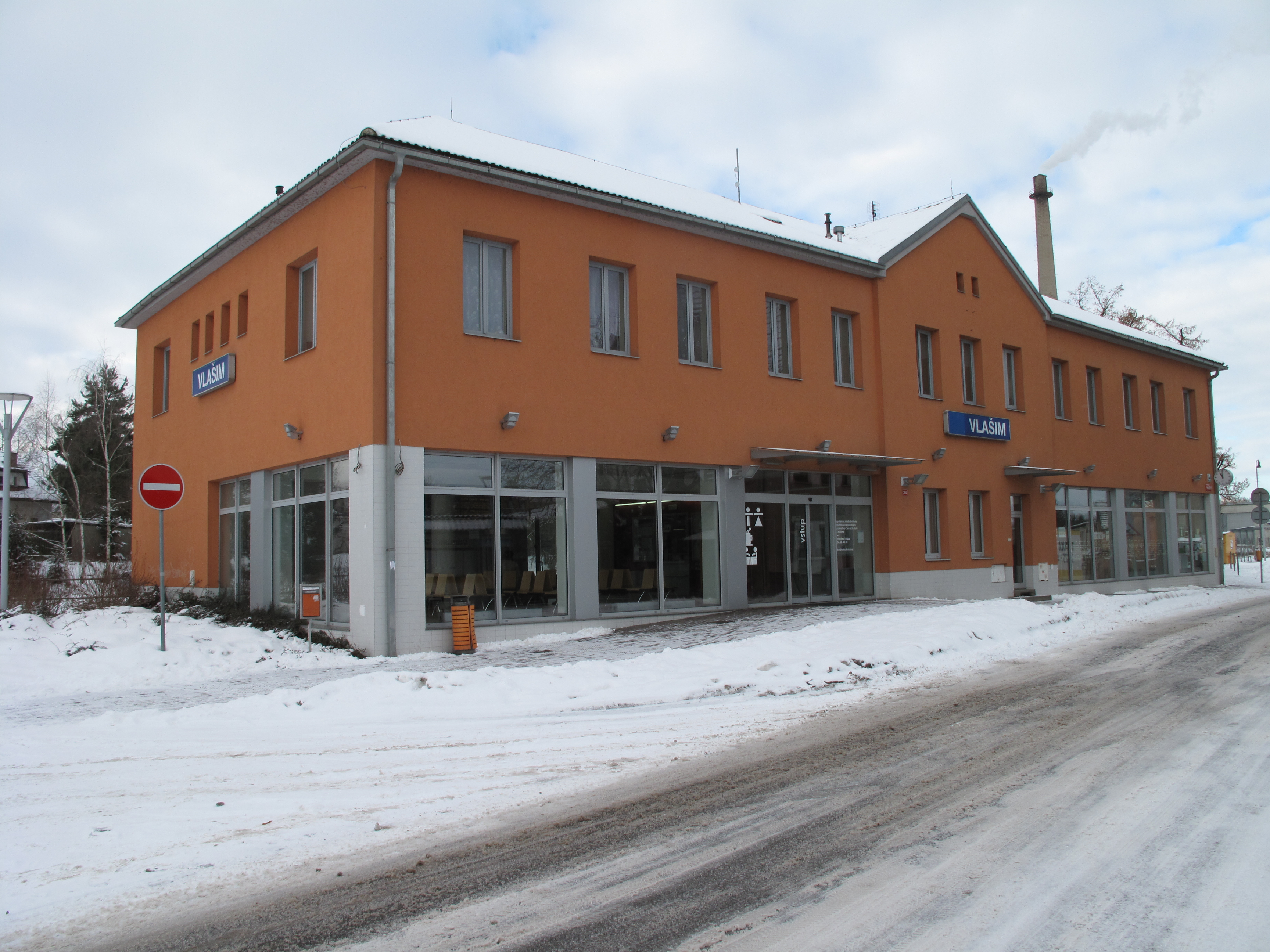 Vlašim. Okres Benešov, Česká republika.